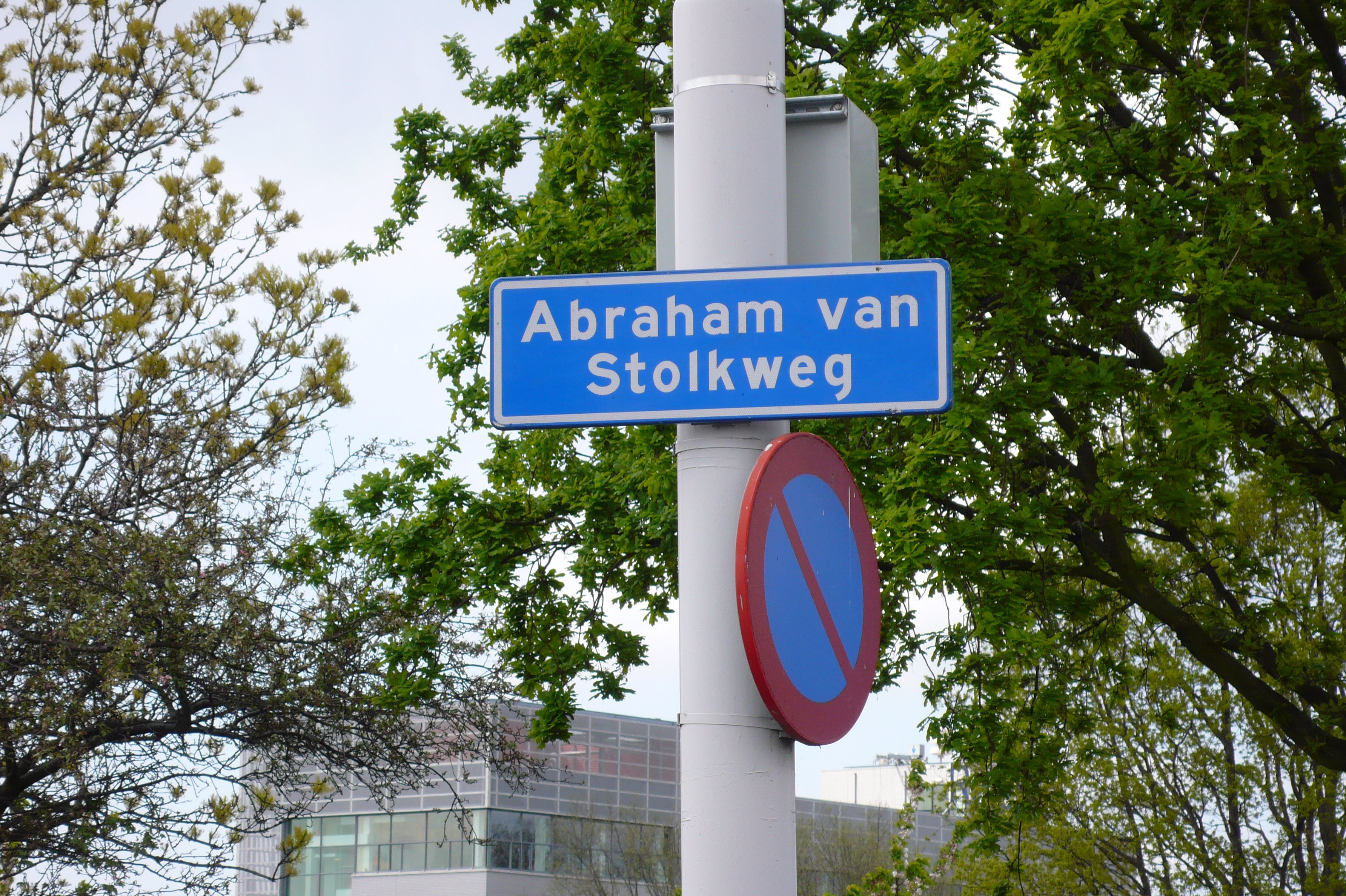 streetsign Abraham van Stolkweg, Rotterdam, The Netherlands